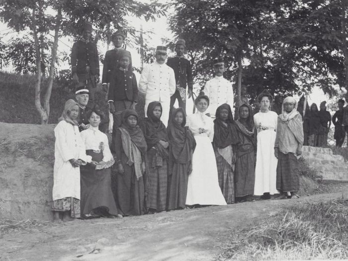 Foto. Groepsportret met familieleden van Panglima Polim, Atjeh